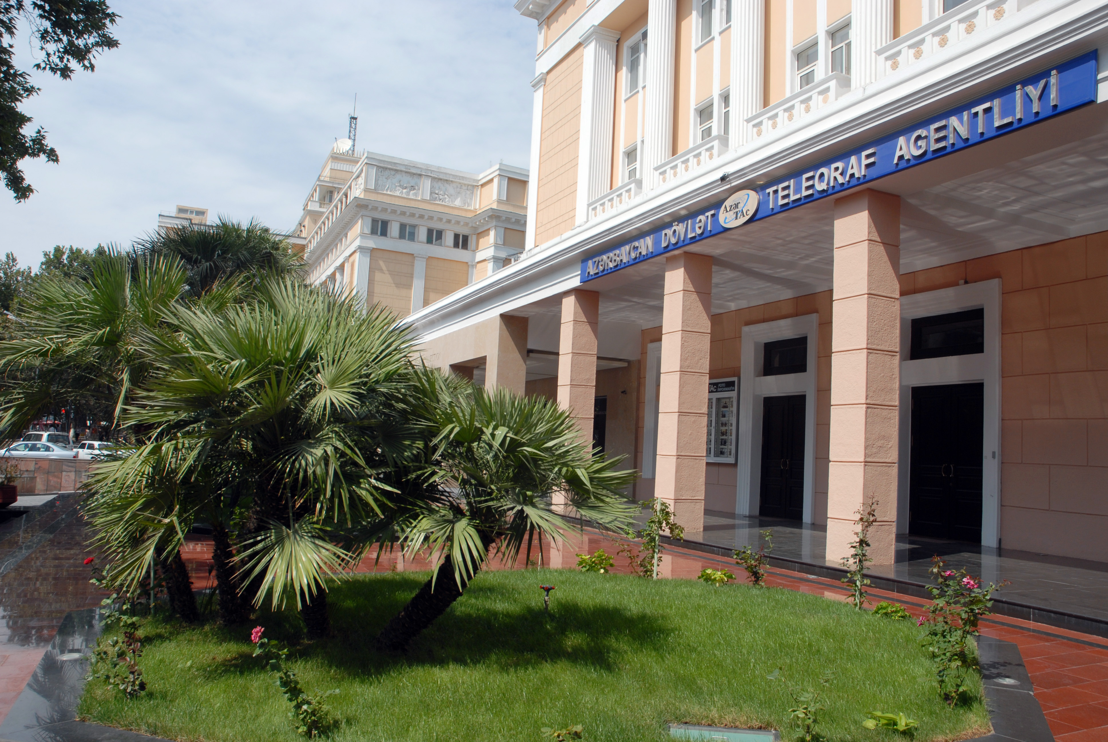 AzərTAcın binası